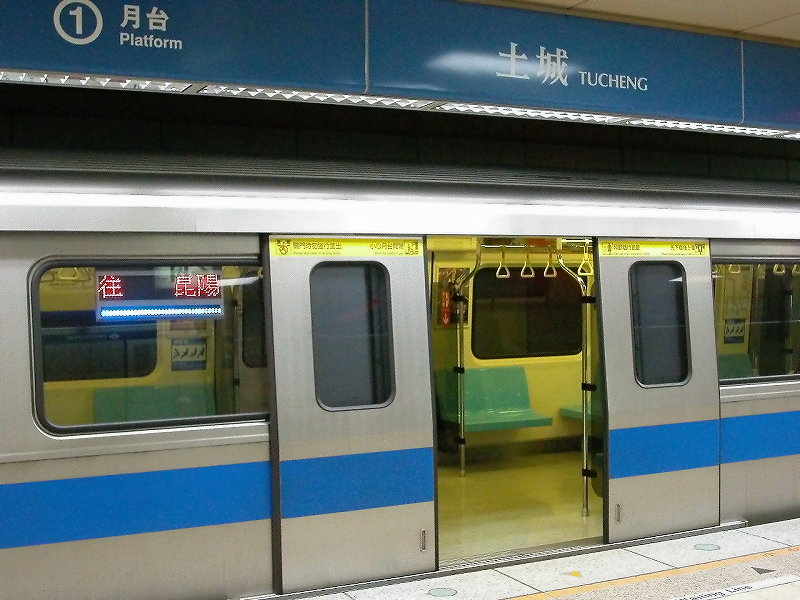 土城站，Tucheng Station